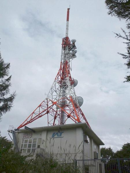 MIT・IAT新山送信所